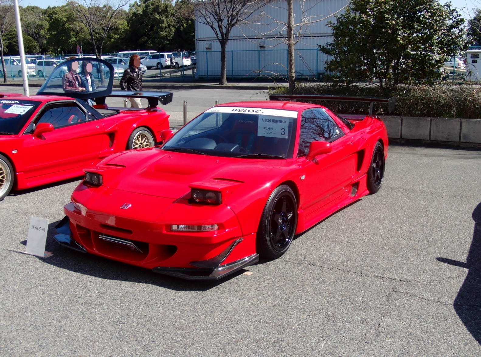 NAGOYAオートトレンド2011においてNA1型ホンダ・NSXを撮影。